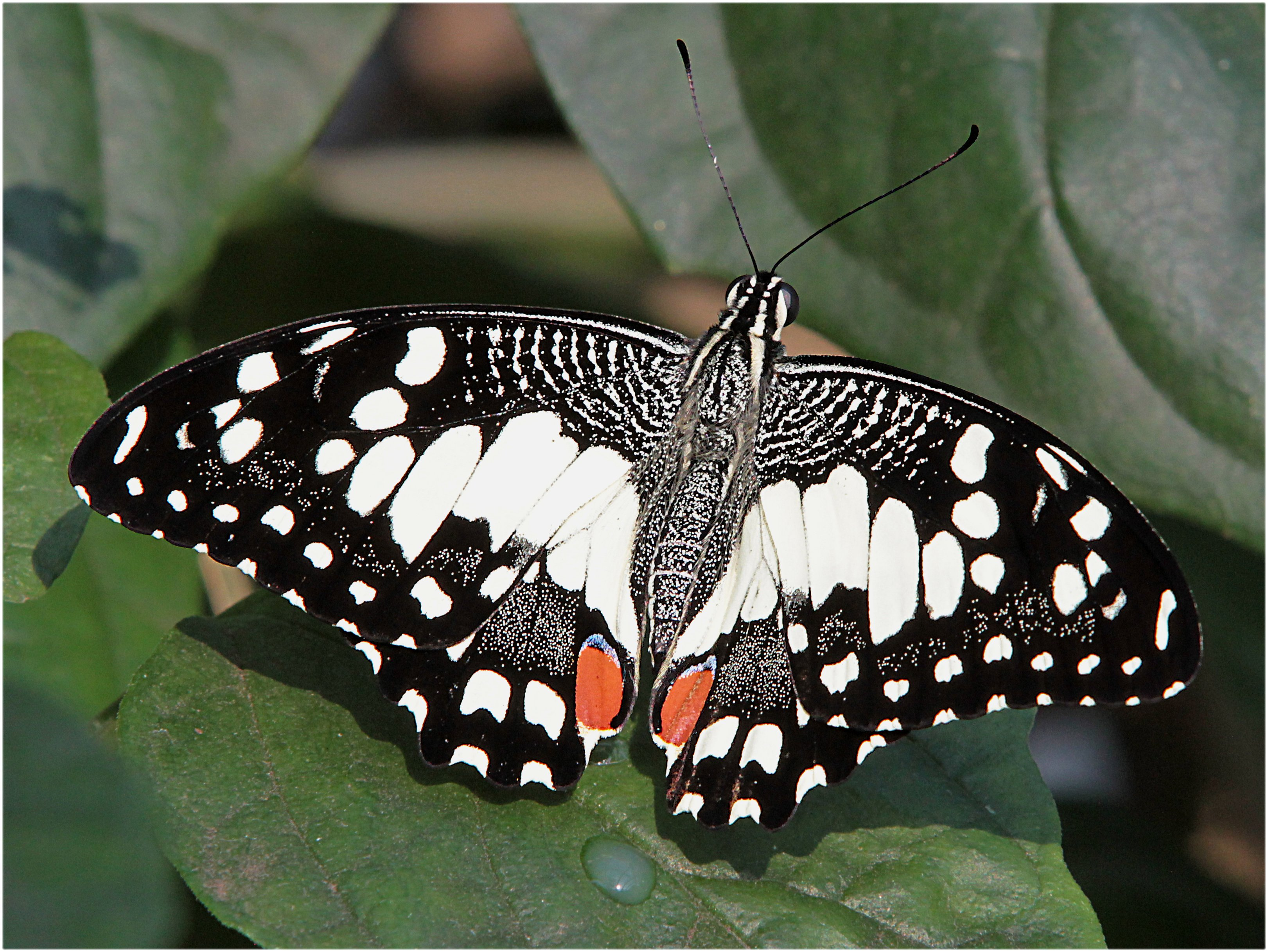 papilio demoleus Ritterfalter frisch aufgepumpt von oben